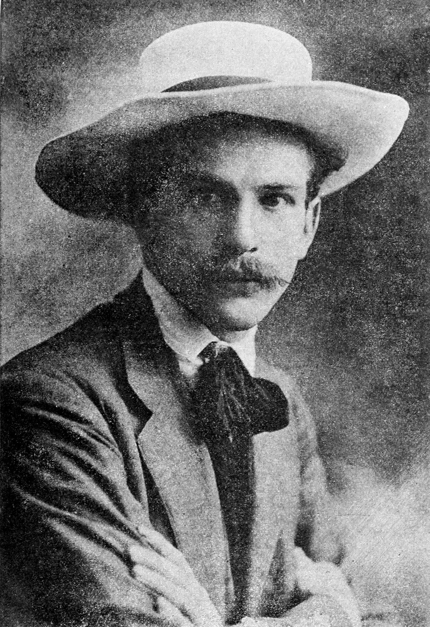 Ritratto di Scipio Slataper